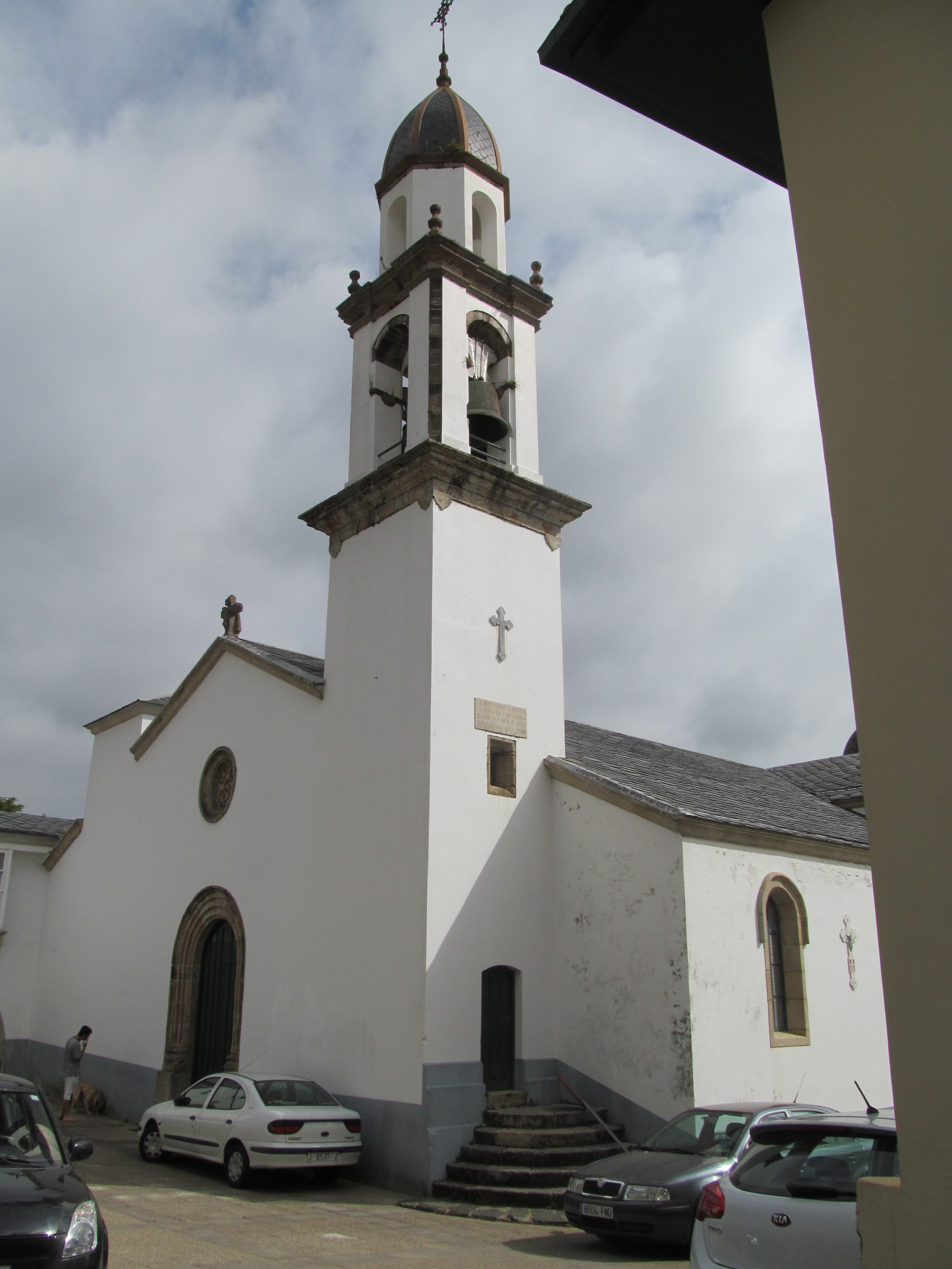 Cedeira - Iglesia parroquial de Santa María del Mar de estilo gótico del siglo XV. Planta rectangular con tres naves y un ábside poligonal, se encuentra en Cedeira, A Coruña, Galicia, España.